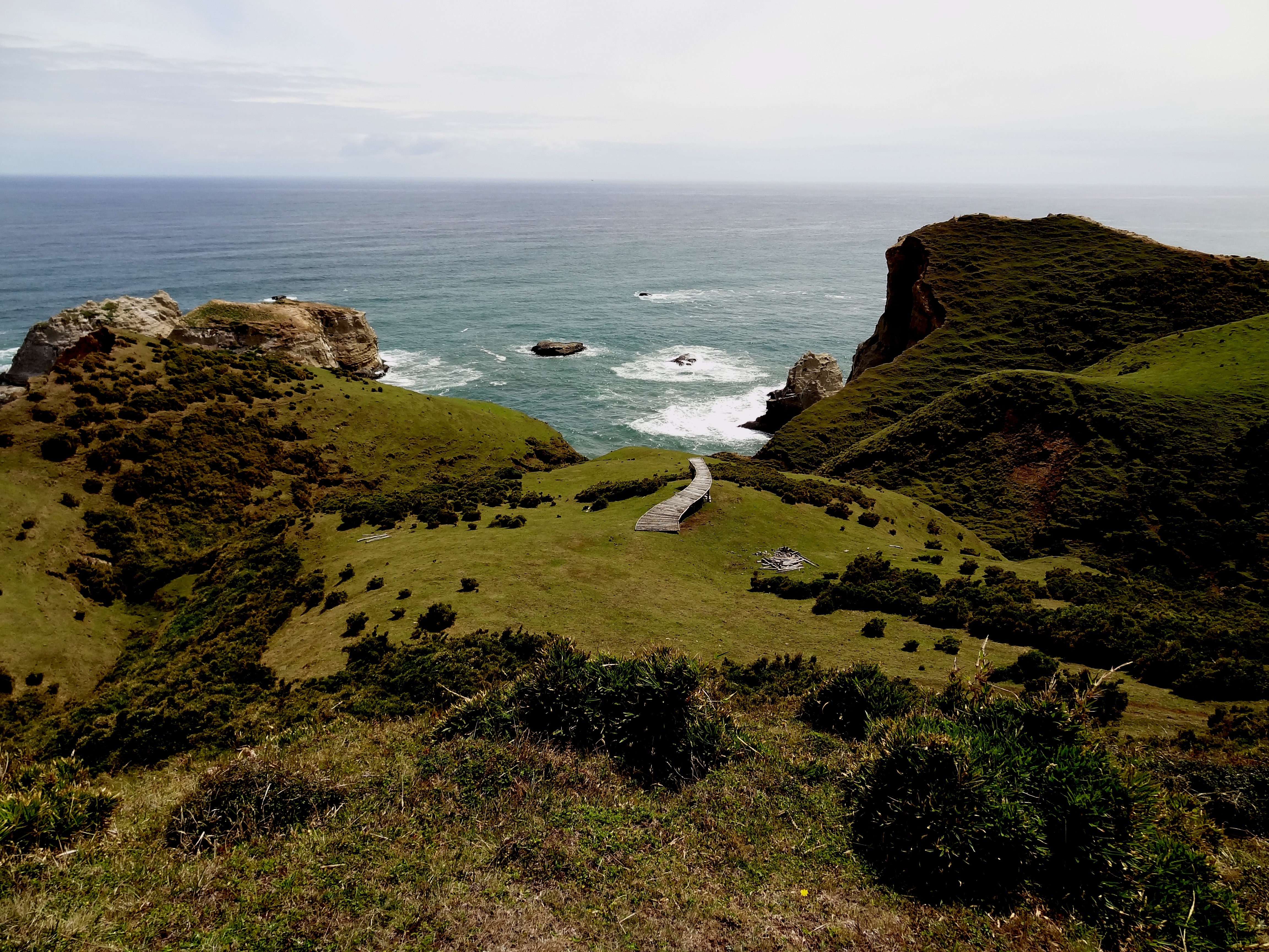 Es una instalación ubicada en el sector de Rahue-Pirulil. Se llega después de aproximadamente una hora de trekking por lomajes costeros.